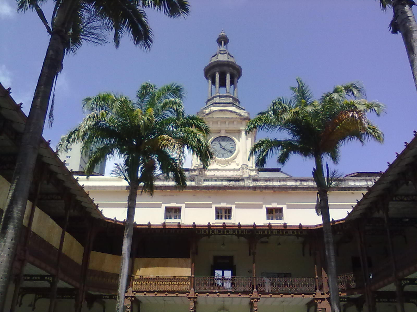 Recife, Pernambuco (Brasil). Faculdade de Direito da Universidade Federal de Pernambuco, relógio.